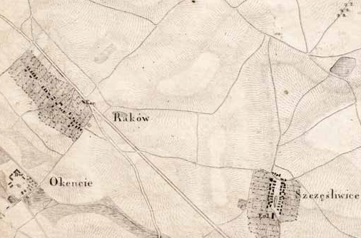 Mapa okolic Okęcia, Szczęśliwic i Rakowca (Warszawa) z 1819 roku.